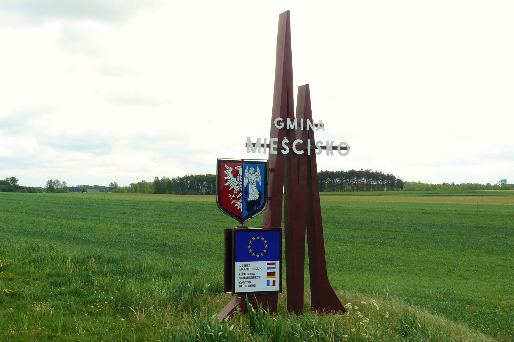 Stend Gminy Mieścisko.